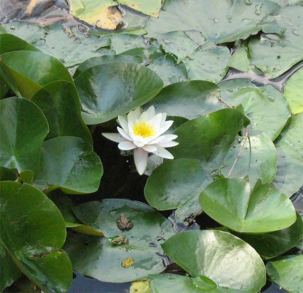 Краснокутський_дендропарк: Краснокутський дендропарк, лотоси на ставку, с.Основинці, Краснокутський район, Харківська область